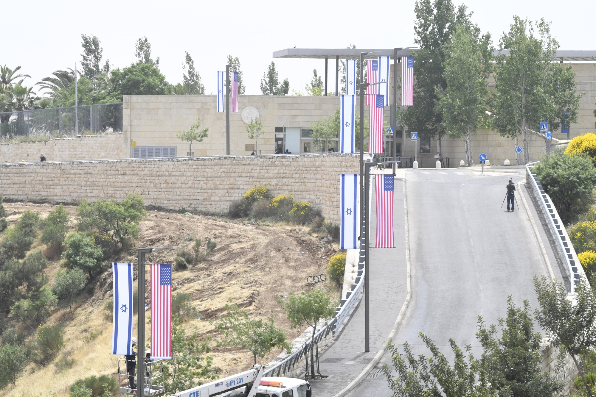 _DSC0565